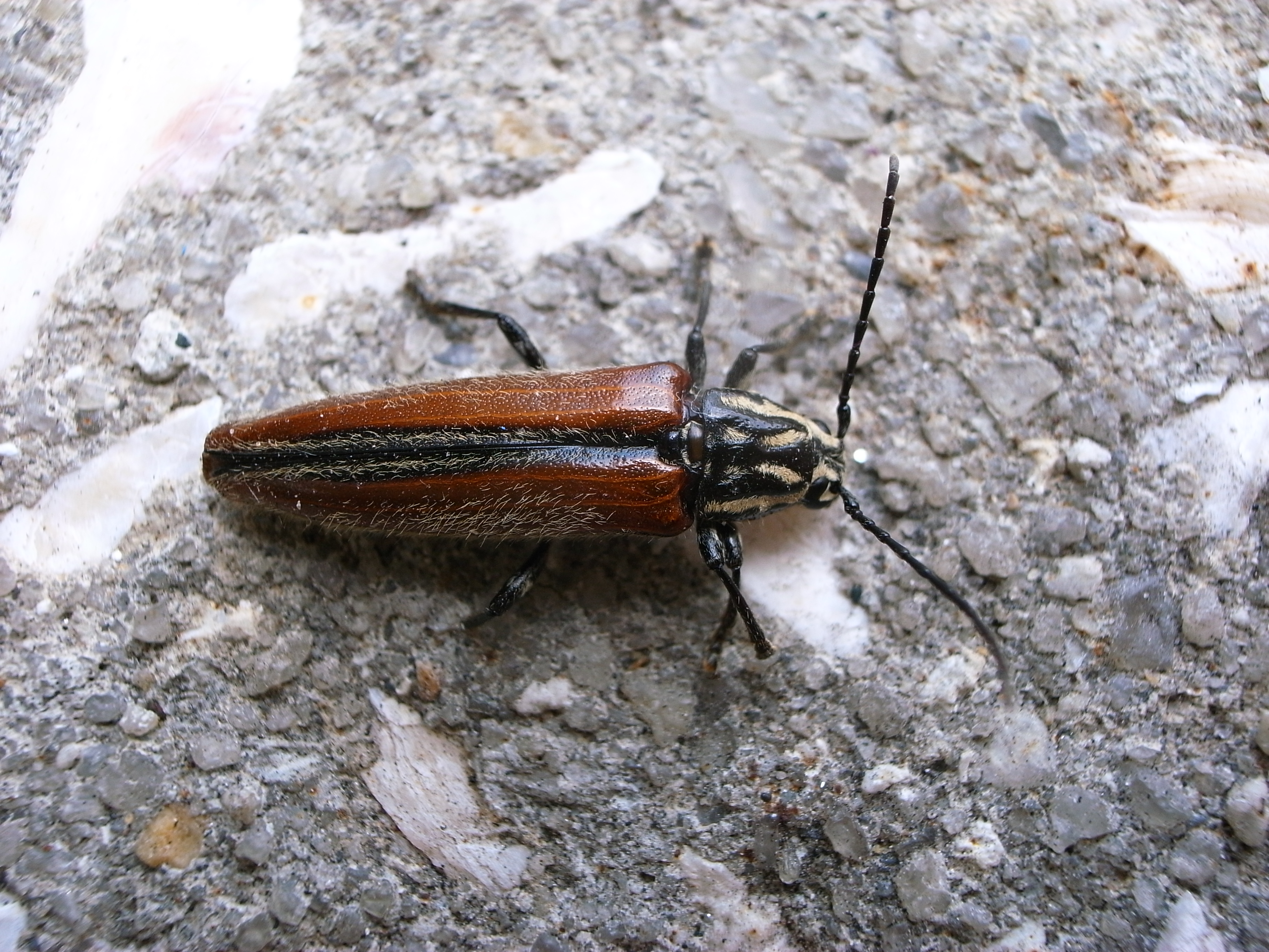 Käfer, Charleston International Airport